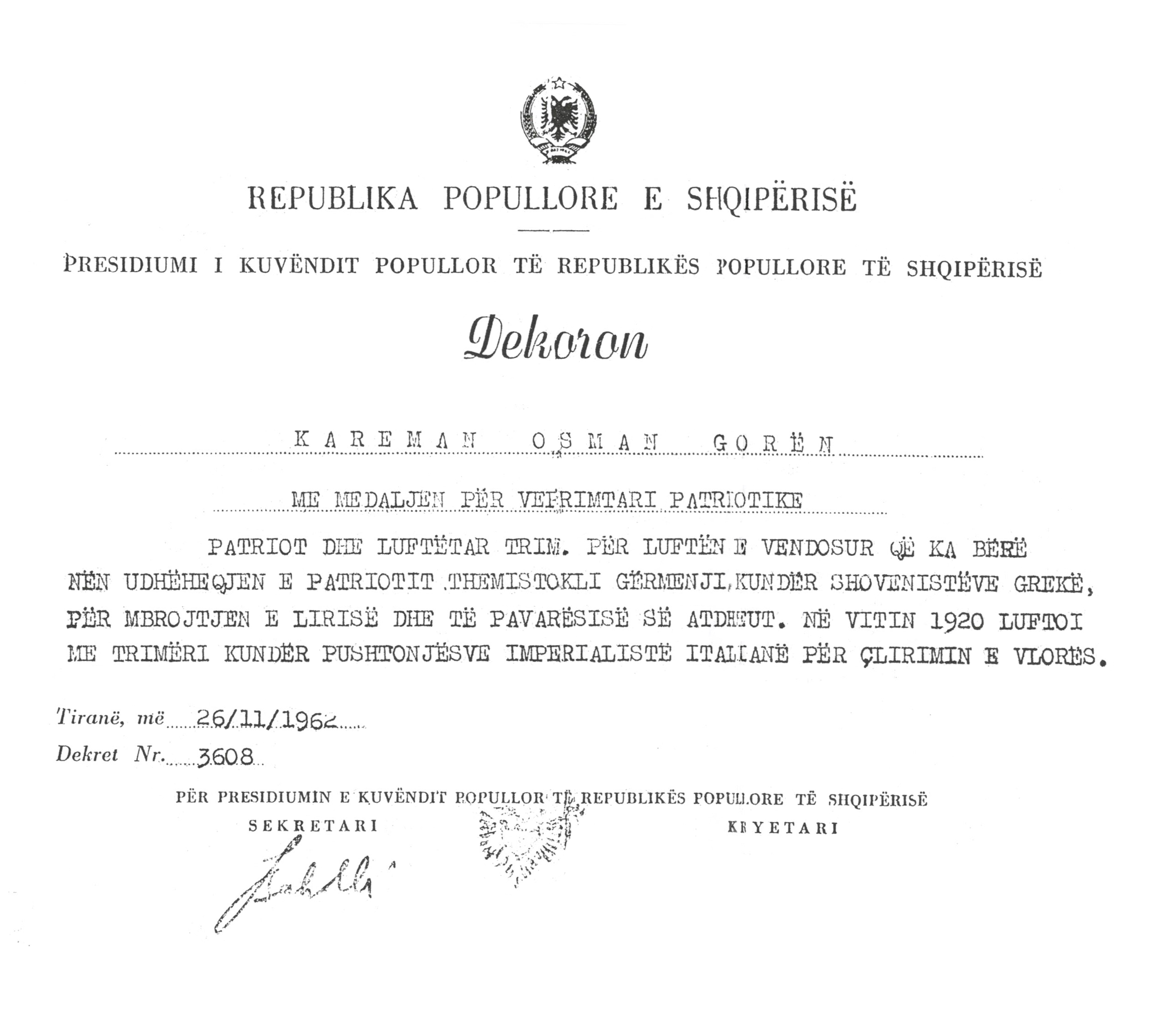 Dekoratë për Kareman Gorën